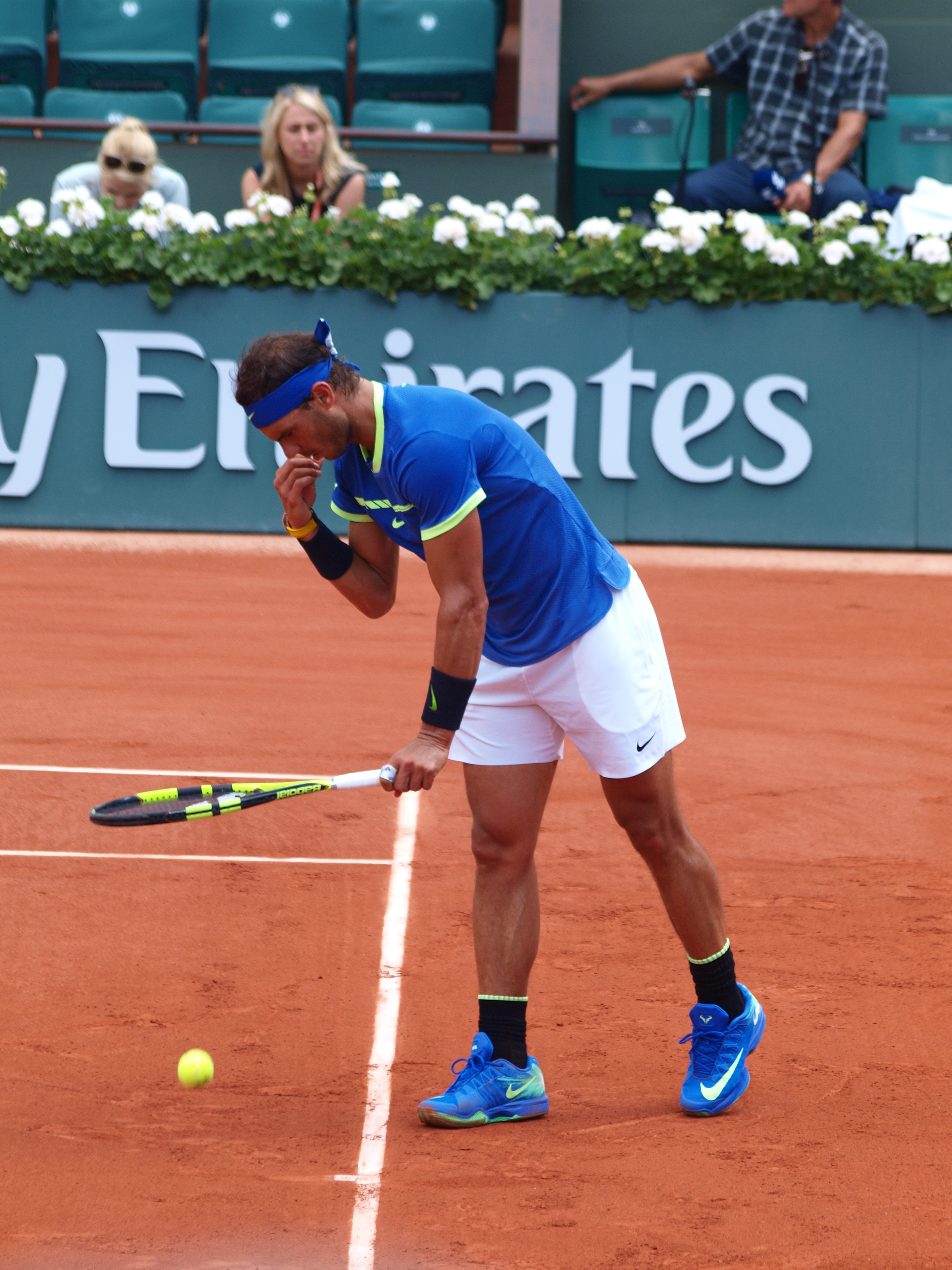 Rafael Nadal lors des Internationaux de France de Tennis au stade Roland Garros de Paris, le 2 juin 2017, durant le match contre Nikoloz Basilashvili.